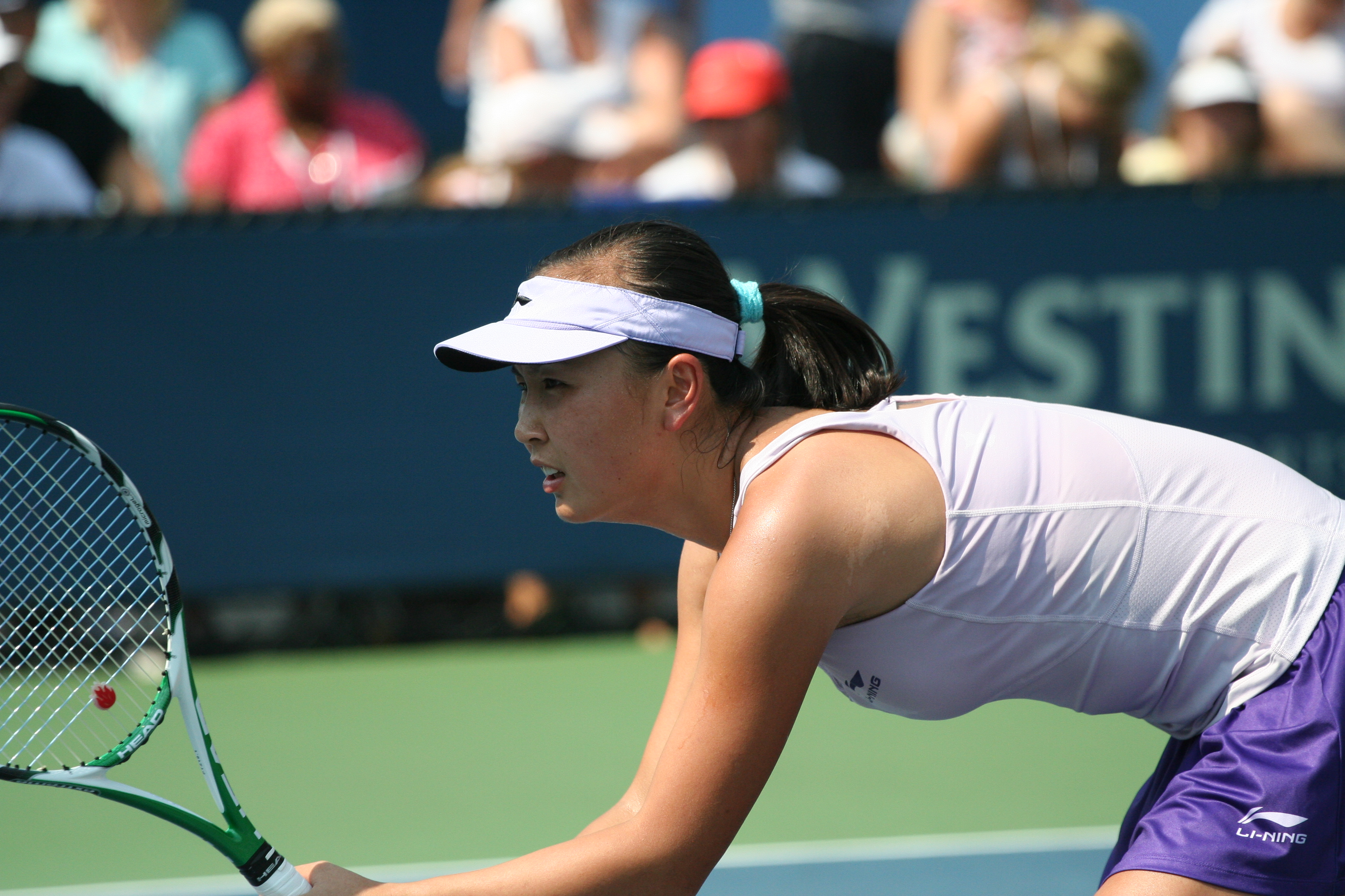 U.S. Open Sept. 1, 2010